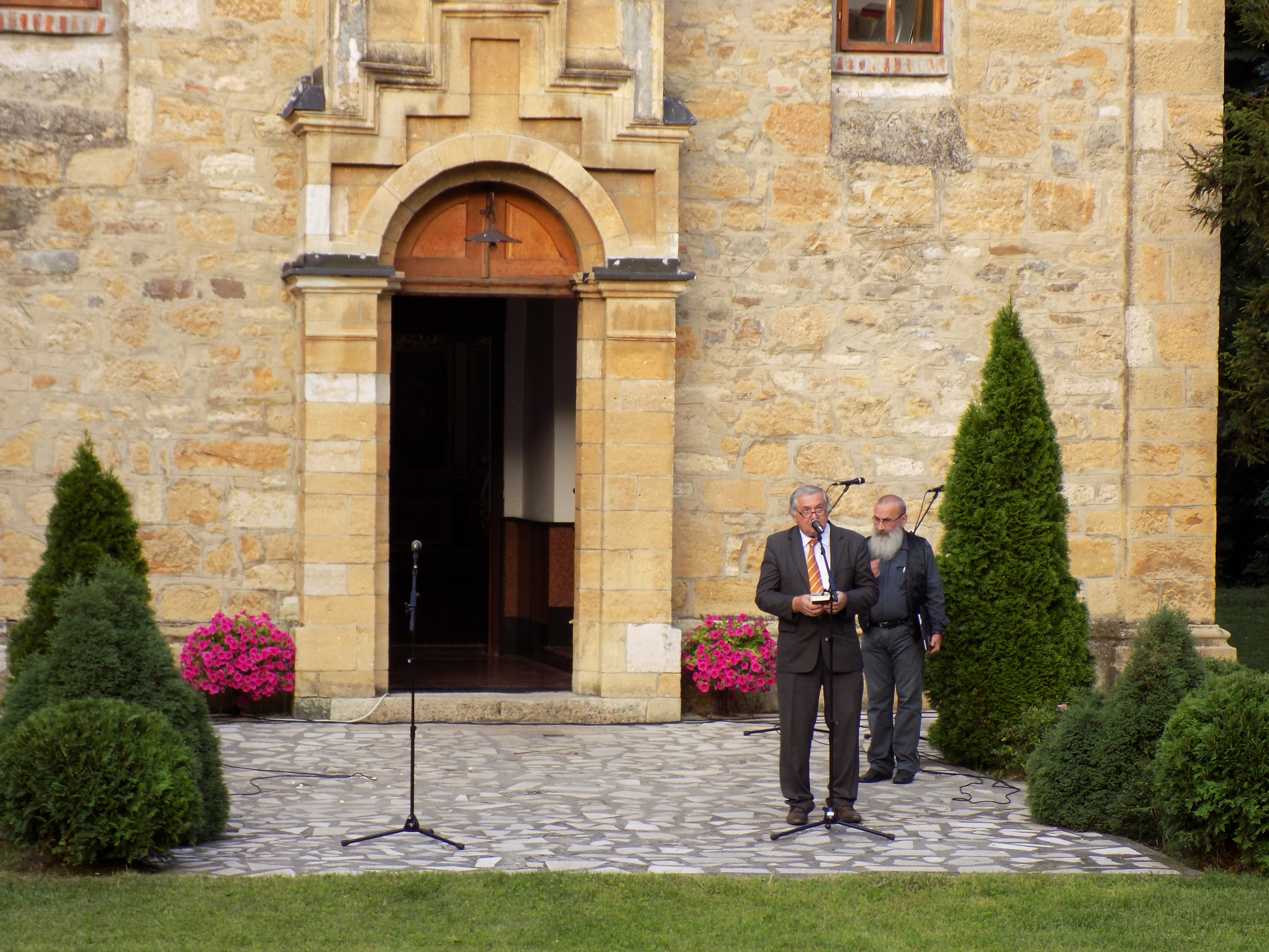 Dr Jovan Delić Dodeluje nagradu "Moma Dimić" Goranu Gocicu tokom programa "Petrovdan u Nemenikućama" u okviru manifestacije "Dani Milovana Vidakovića", 12. juli 2018